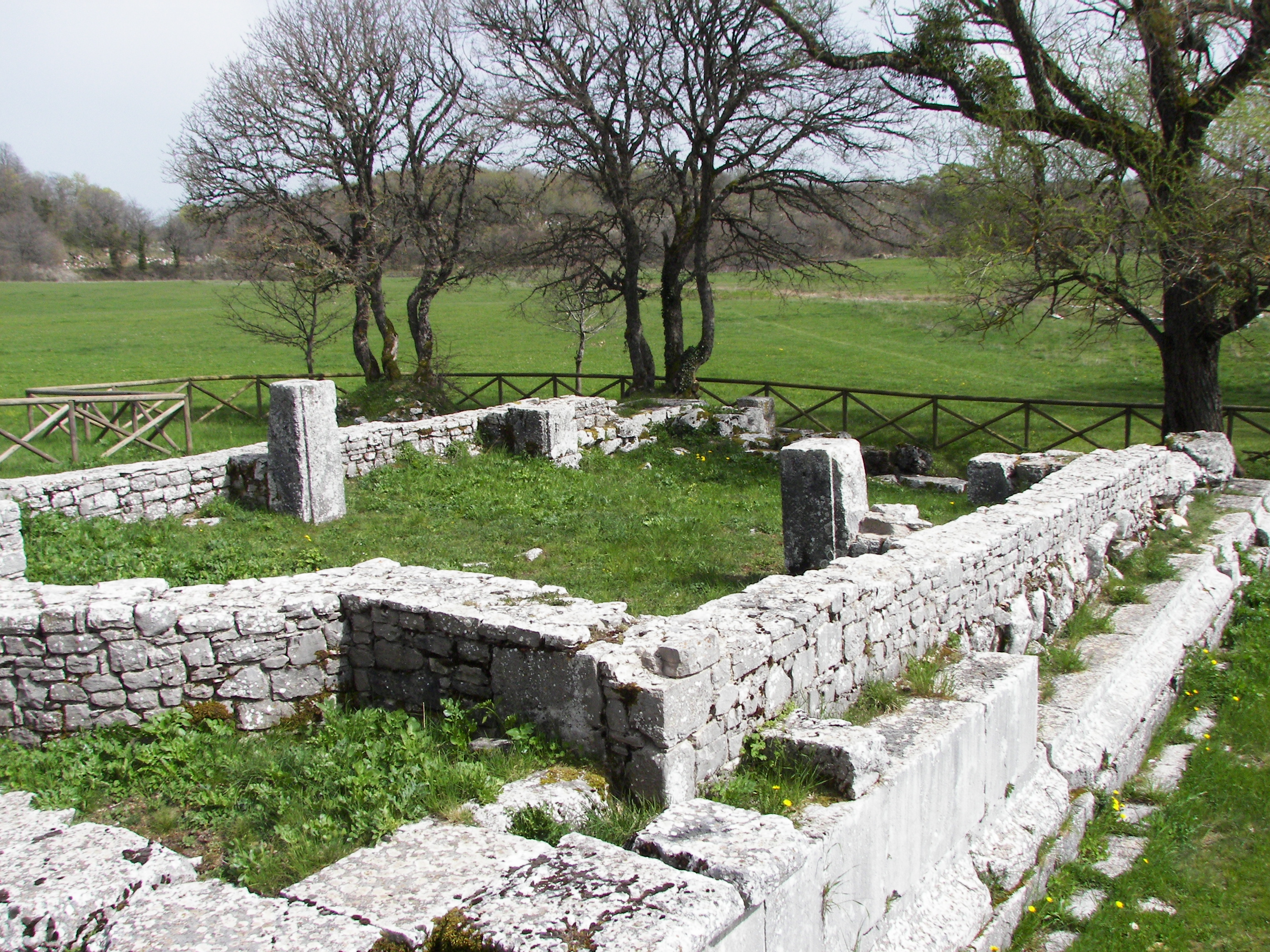 Tempio sannitico di Vastogirardi (IS)